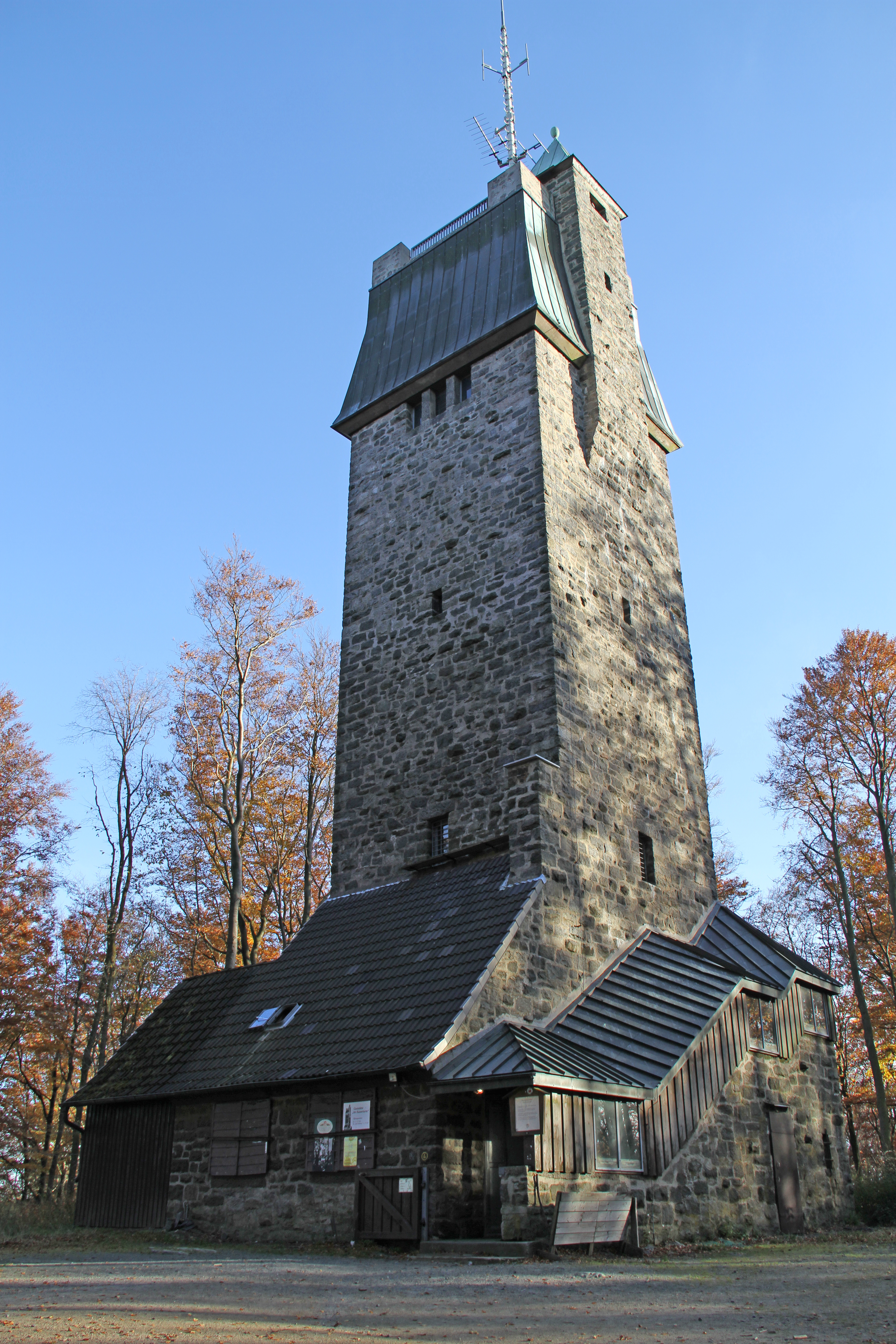 Kaiserturm auf der Neunkircher Höhe bei Modautal im Landkreis Darmstadt-Dieburg.